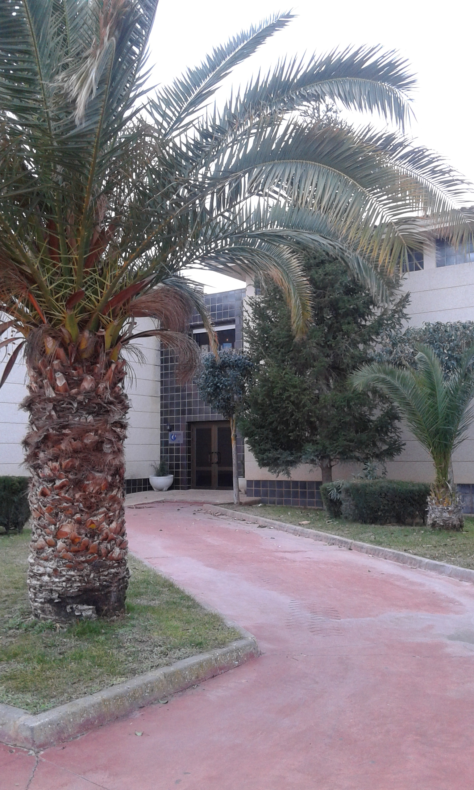 Casa de la Cultura y la Biblioteca